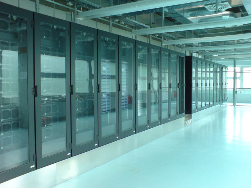 Serverraum des Kommunikations- und Informationszentrums der Universität Ulm